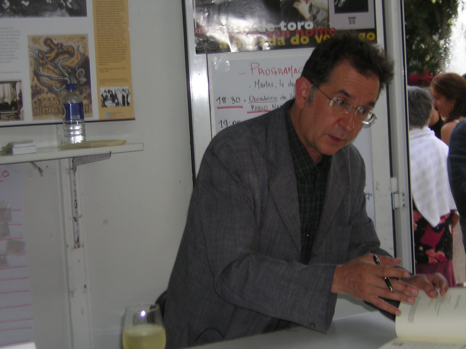 Suso de Toro asinando exemplares das súas obras na Feira do Libro de Vigo do 2006